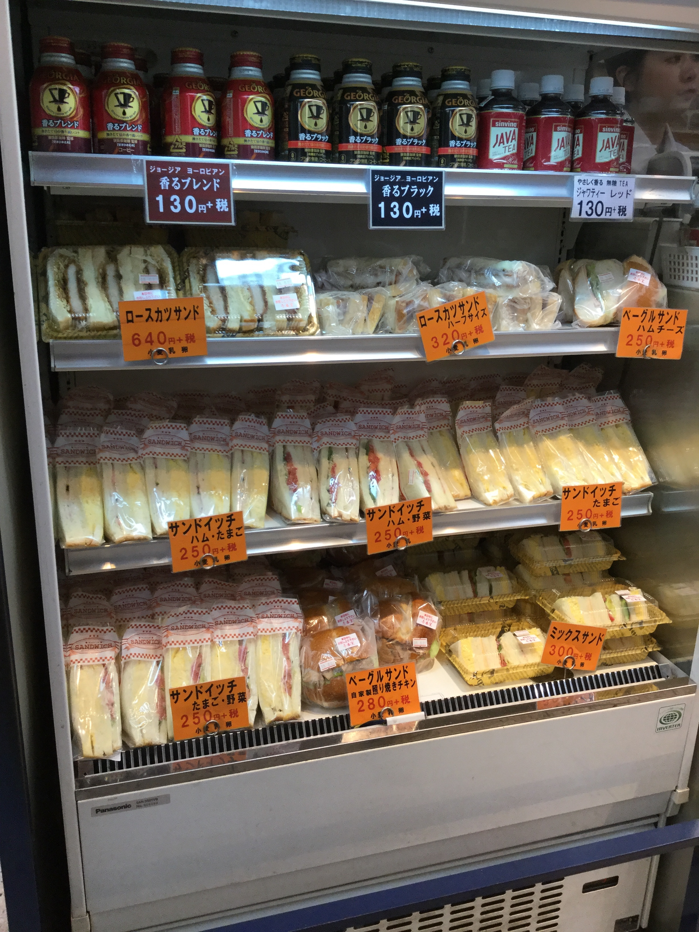 シンビーノ